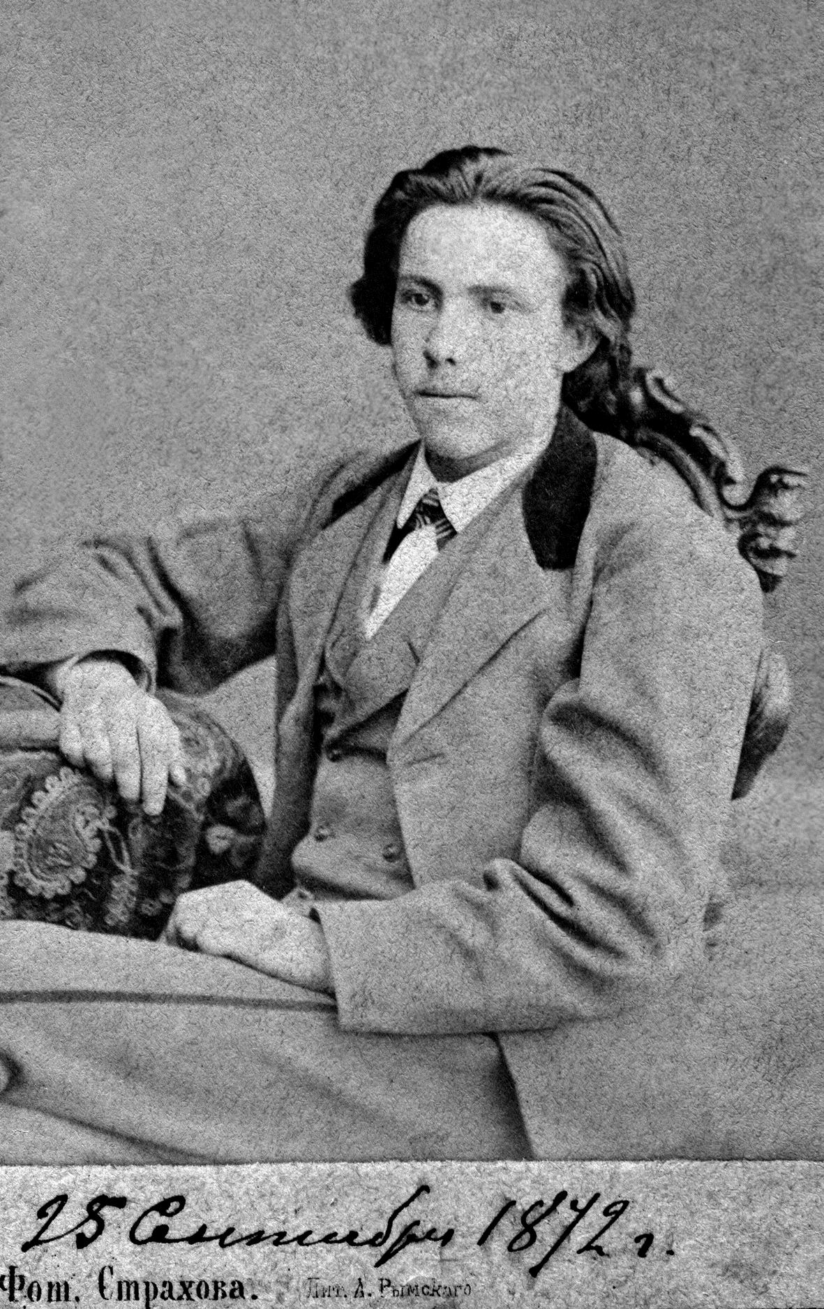 С.Гилёв студент Московской консерватории 25.09.1872